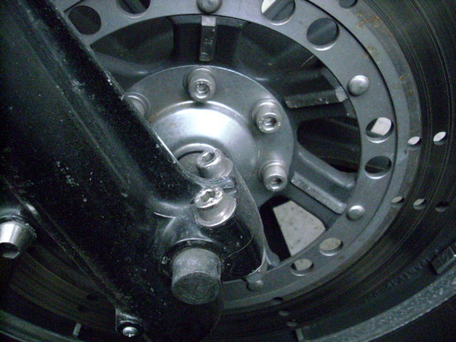 Kawasaki Z1300 アクスルシャフトのボルト2本